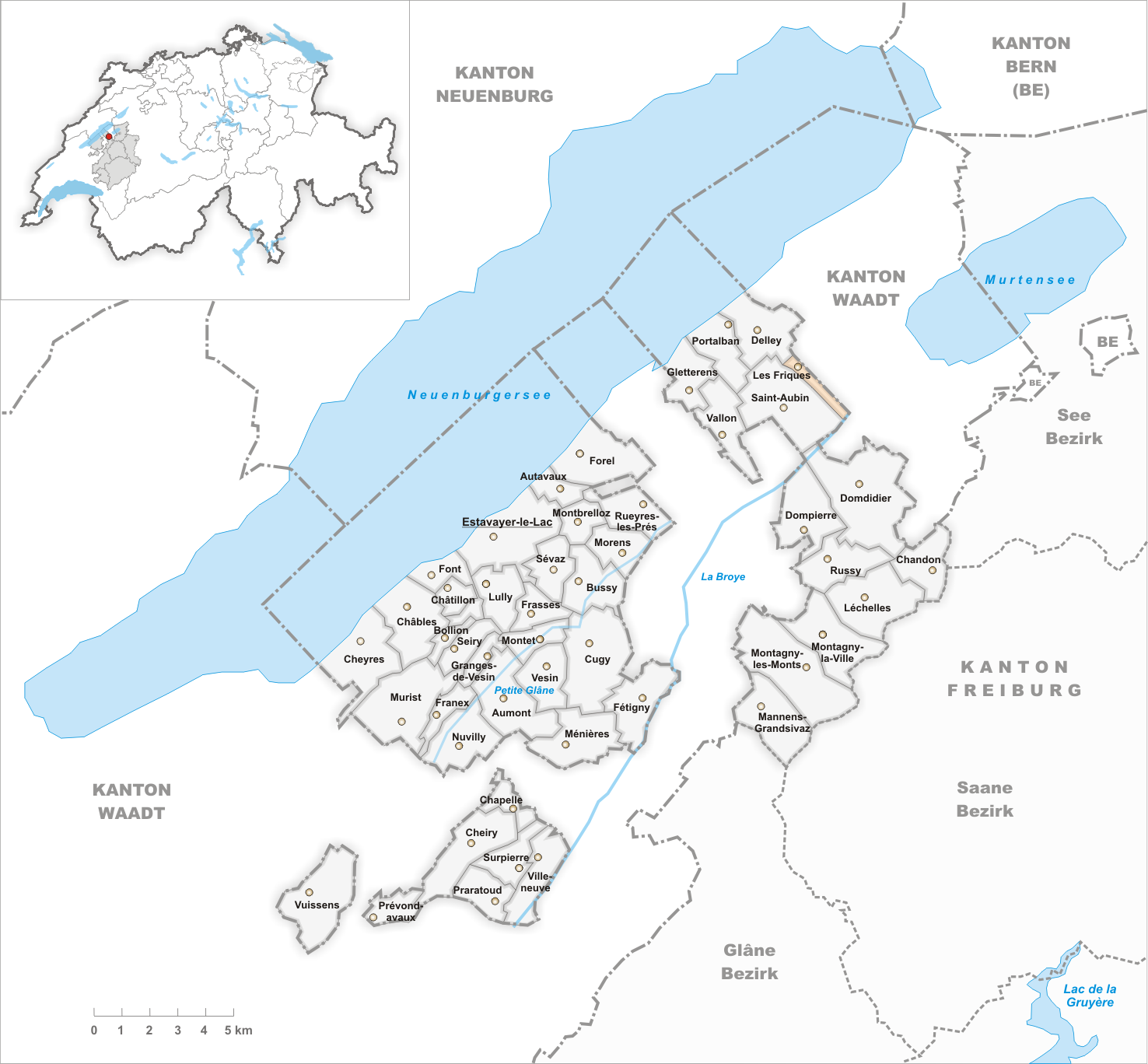 Municipality Les Friques Artist: Tschubby